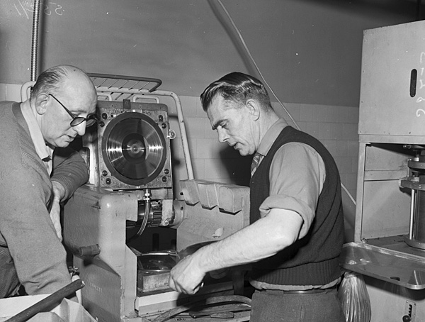 Teitl Cymraeg/Welsh title: Nodwedd ar Qualiton Records, Pontardawe Ffotograffydd/Photographer: Geoff Charles (1909-2002) Dyddiad/Date: Rhagfyr/ December 3, 1959 Cyfrwng/Medium: Negydd ffilm / Film negative Cyfeiriad/Reference: (gch21182) Rhif cofnod / Record no.: 003470441 Rhagor o wybodaeth am gasgliad Geoff Charles yn Llyfrgell Genedlaethol Cymru More information about the Geoff Charles Collection at the National Library of Wales Mae ffotograffau Geoff Charles hefyd yn rhan o Broject Europeana Libraries Geoff Charles' photographs also form part of the Europeana Libraries Project